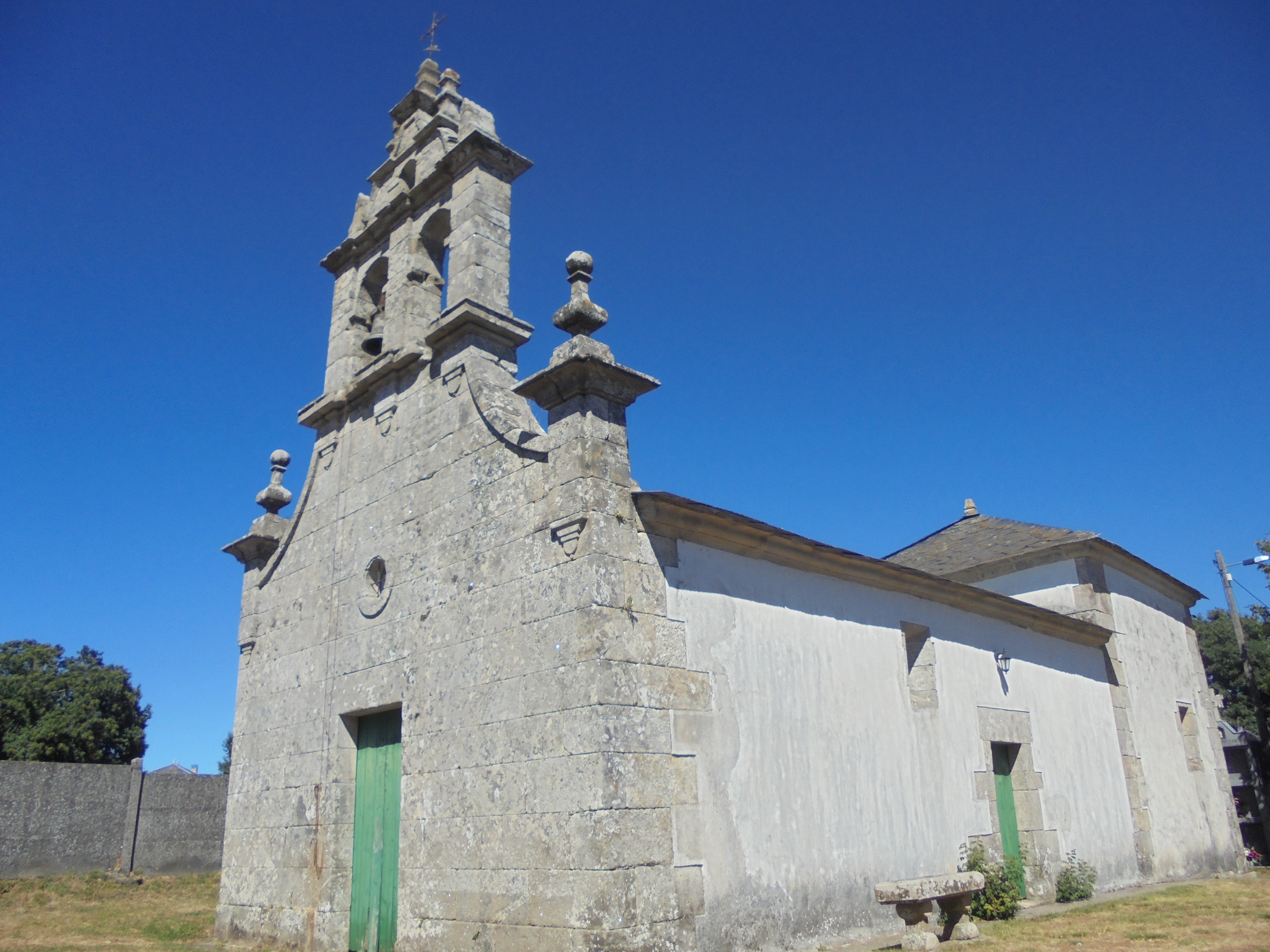 Igrexa parroquial de Santalla de Lamas ( Lugo)